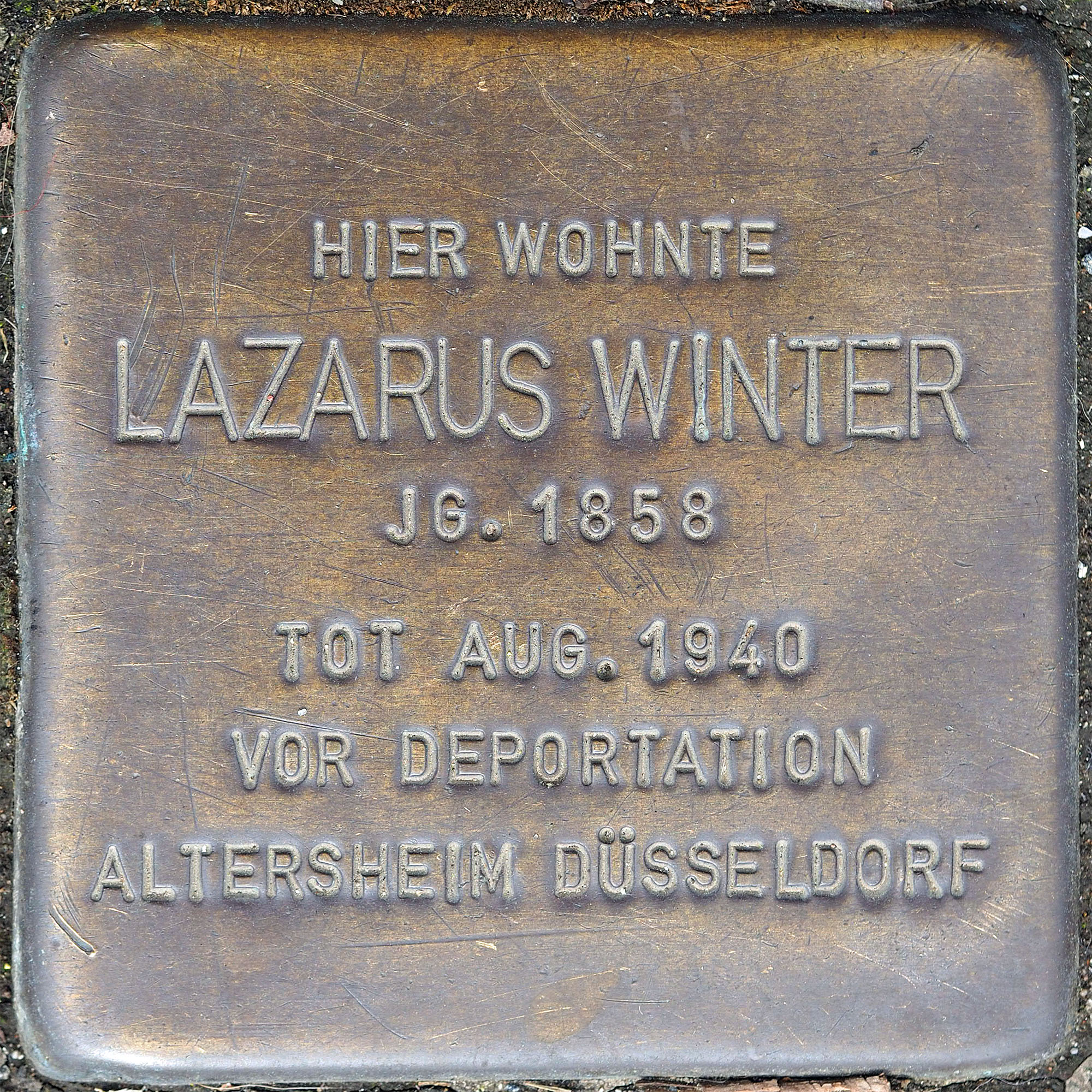 Stolpersteine Korschenbroich: Winter, Lazarus